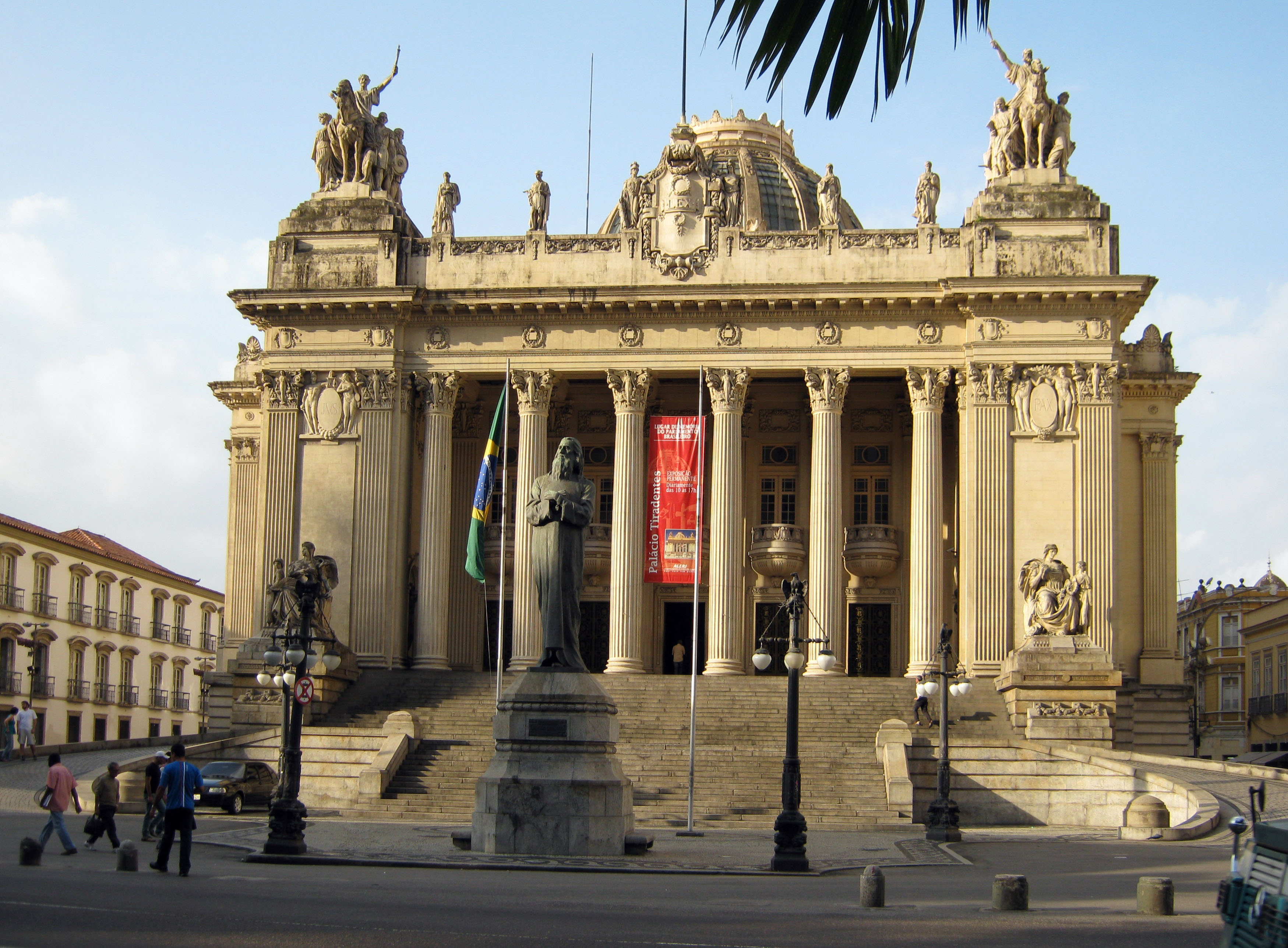 Estátua de Tiradentes. Na frente do Palácio Tiradentes Palácio Tiradentes, Assembleia Legislativa do Estado do Rio de Janeiro (ALERJ) - Antiga Câmara dos Deputados - Muito calcado no Grand Palais de Paris, foi erguido de 1921 à 1924 pelos arquitetos Archimedes Memória e Francisco Couchet, onde havia o prédio da cadeia colonial que recebeu Tiradentes em 1792. (RioTur/Milton Teixeira)